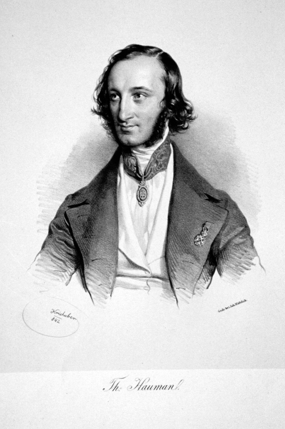 Theodor Haumann (1808-1878), belgischer Geiger und Komponist. Lithographie von Josef Kriehuber, 1842